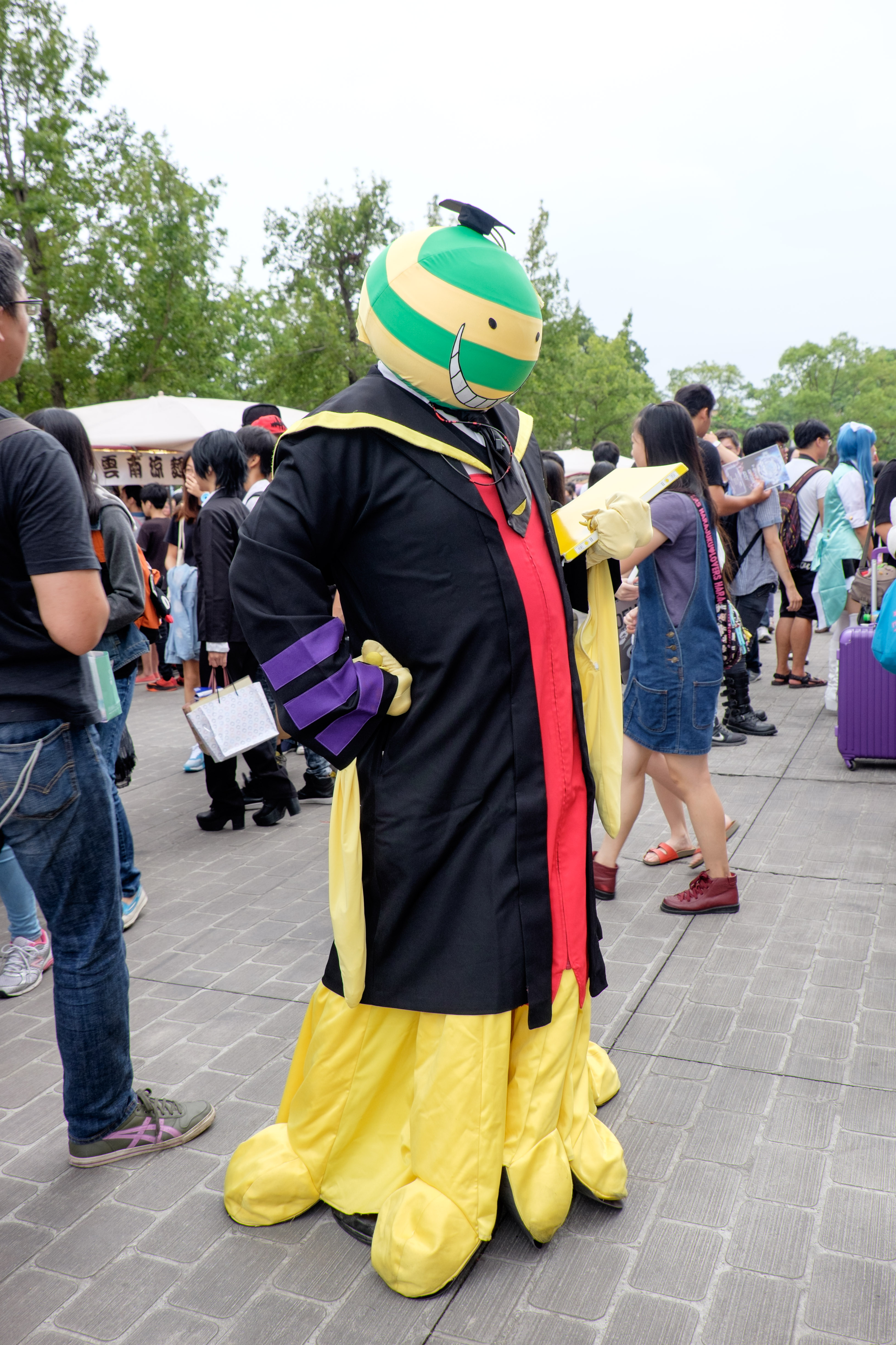 CWT40下午，《暗殺教室》殺老師cosplayer。